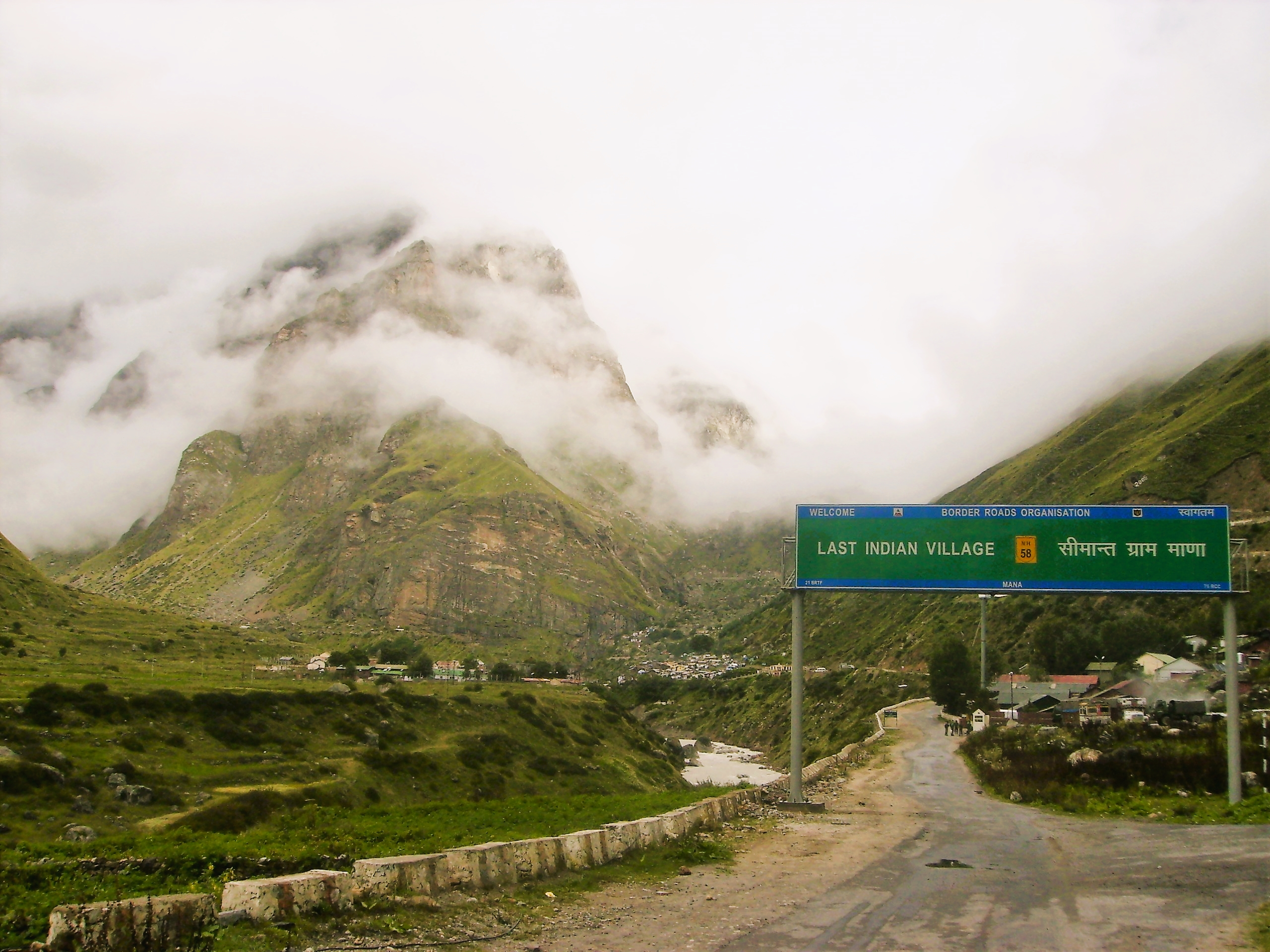 Mana Village, Badrinath, Uttarakhand, India